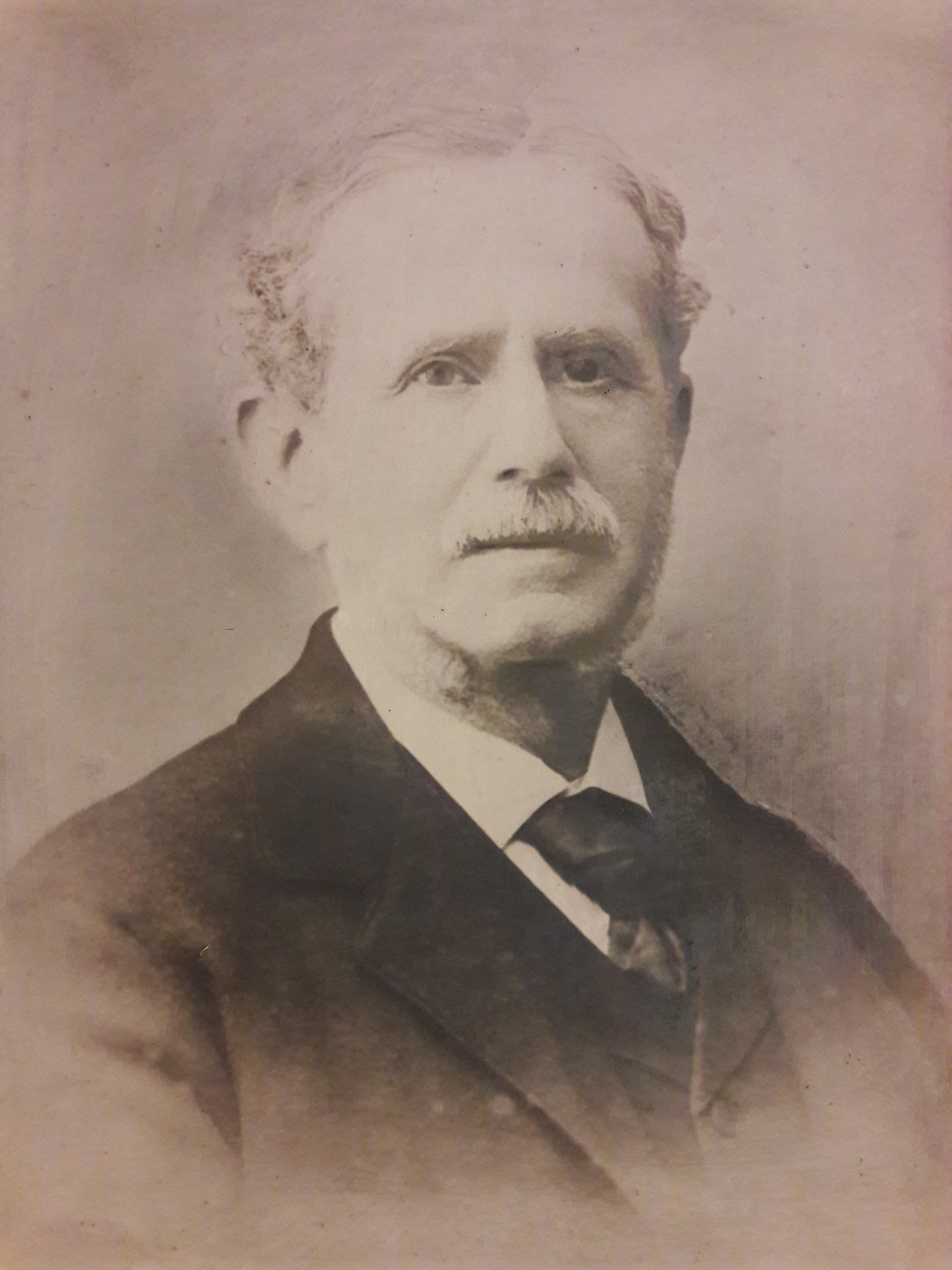 Diplomático Español, Don Augusto Conte y Lerdo de Tejada